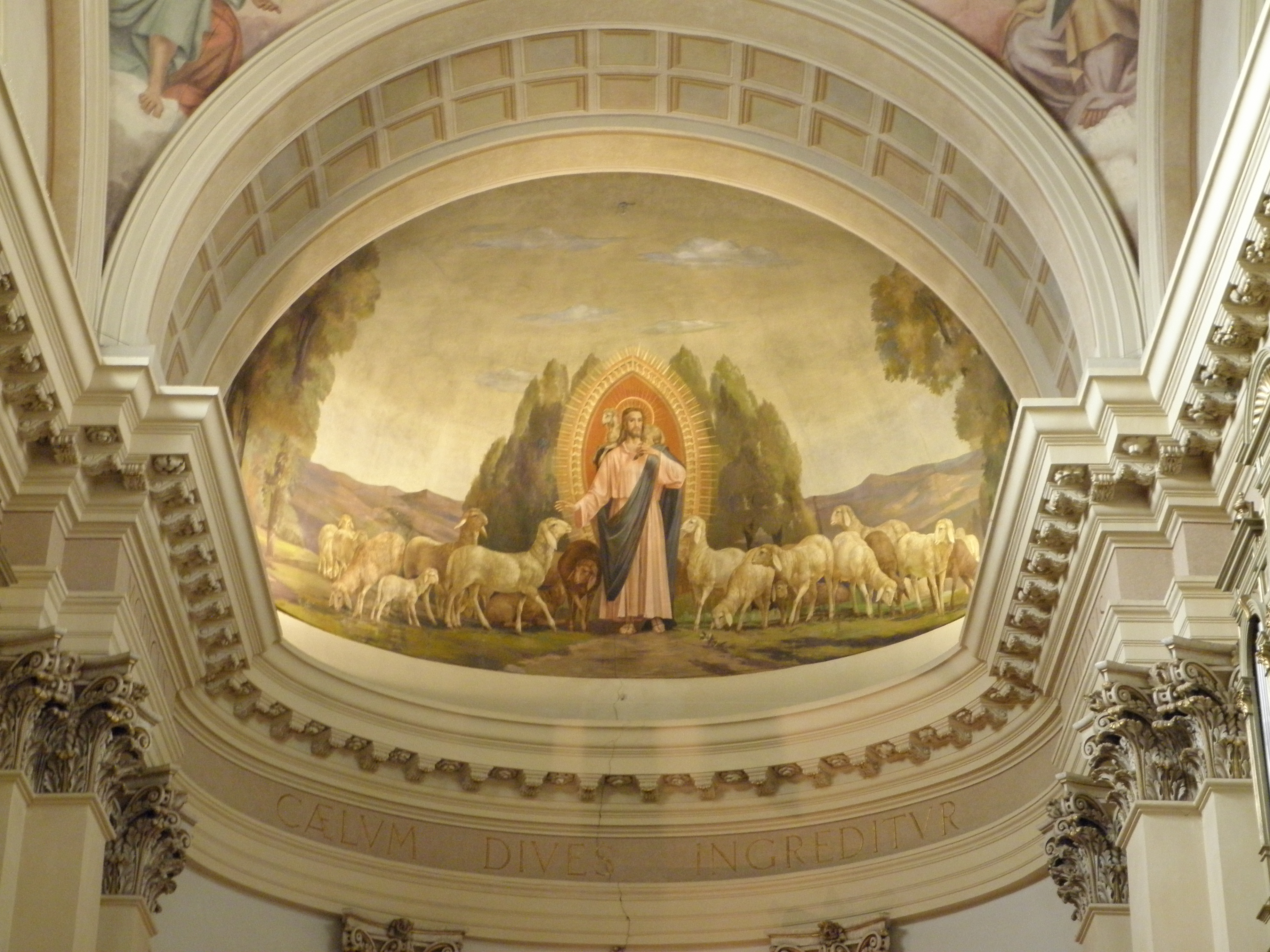 Legnago, Duomo di San Martino Vescovo: interno, il soffitto dell'abside affrescato con il Cristo Buon Pastore.